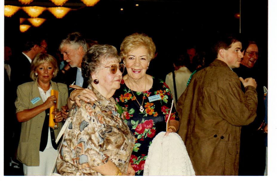 Ke Riema en La Esterella in 1995 n.a.v. haar tachtigste verjaardag